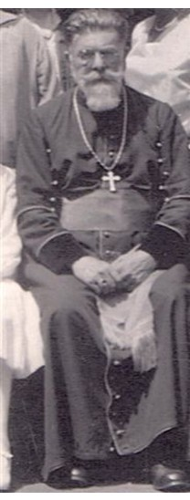 Bischof Robert Tüchler beim Internationalen Altkatholikenkongress 1931